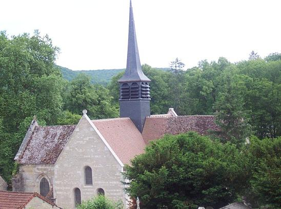 Abbaye de La Bussière, Chevet